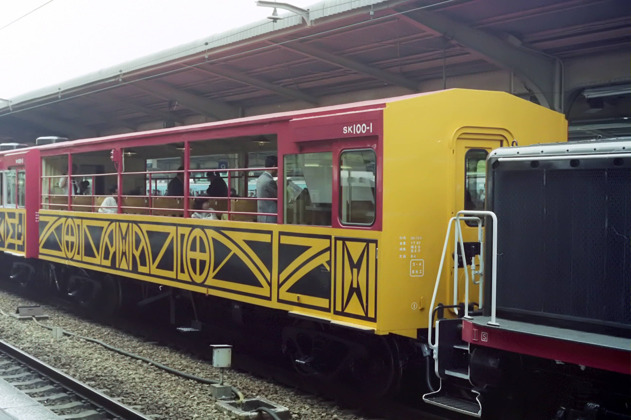 嵯峨野観光鉄道 SK100-1(登場時)